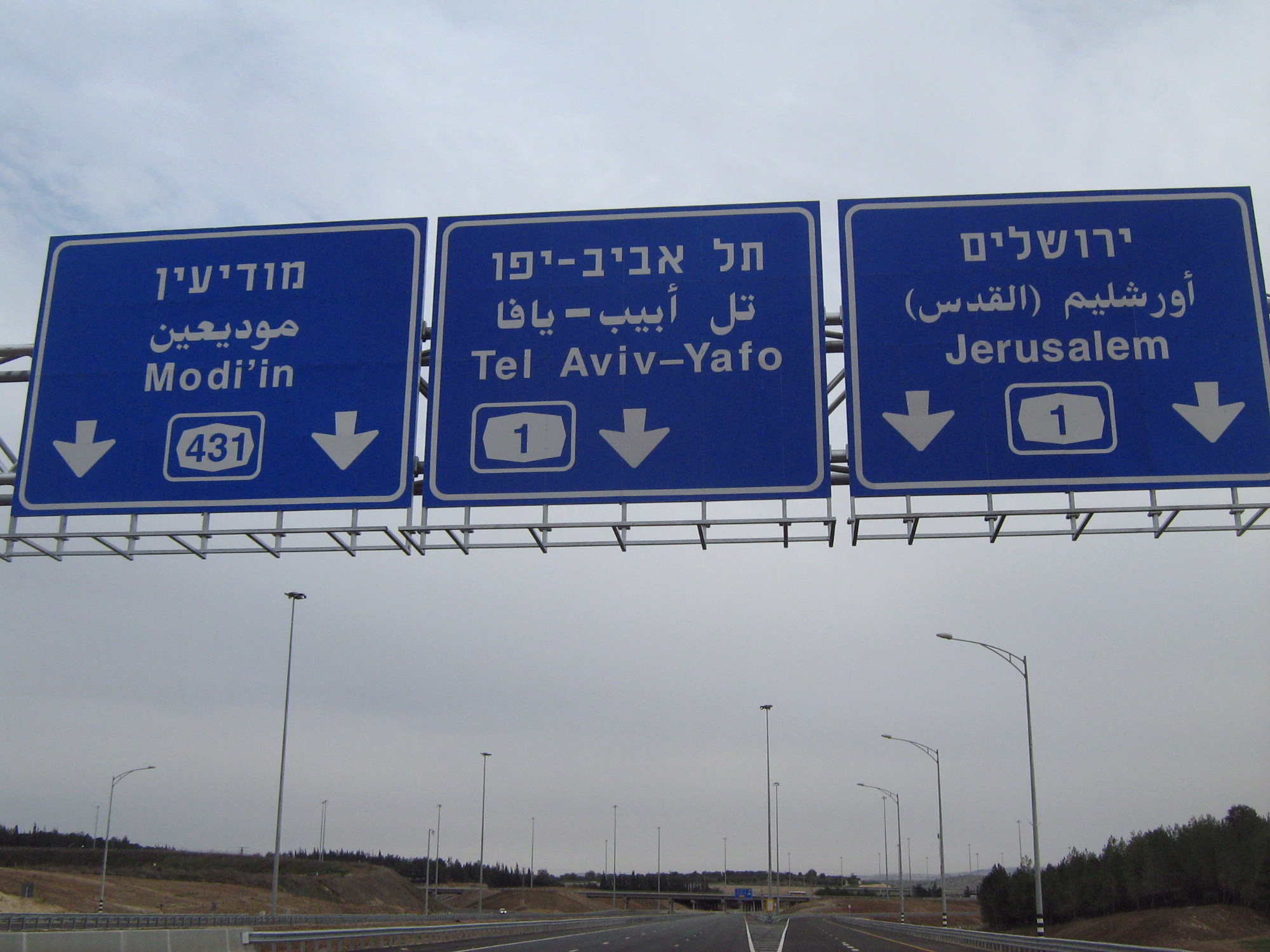 כביש 431 לקראת מחלף ענבה